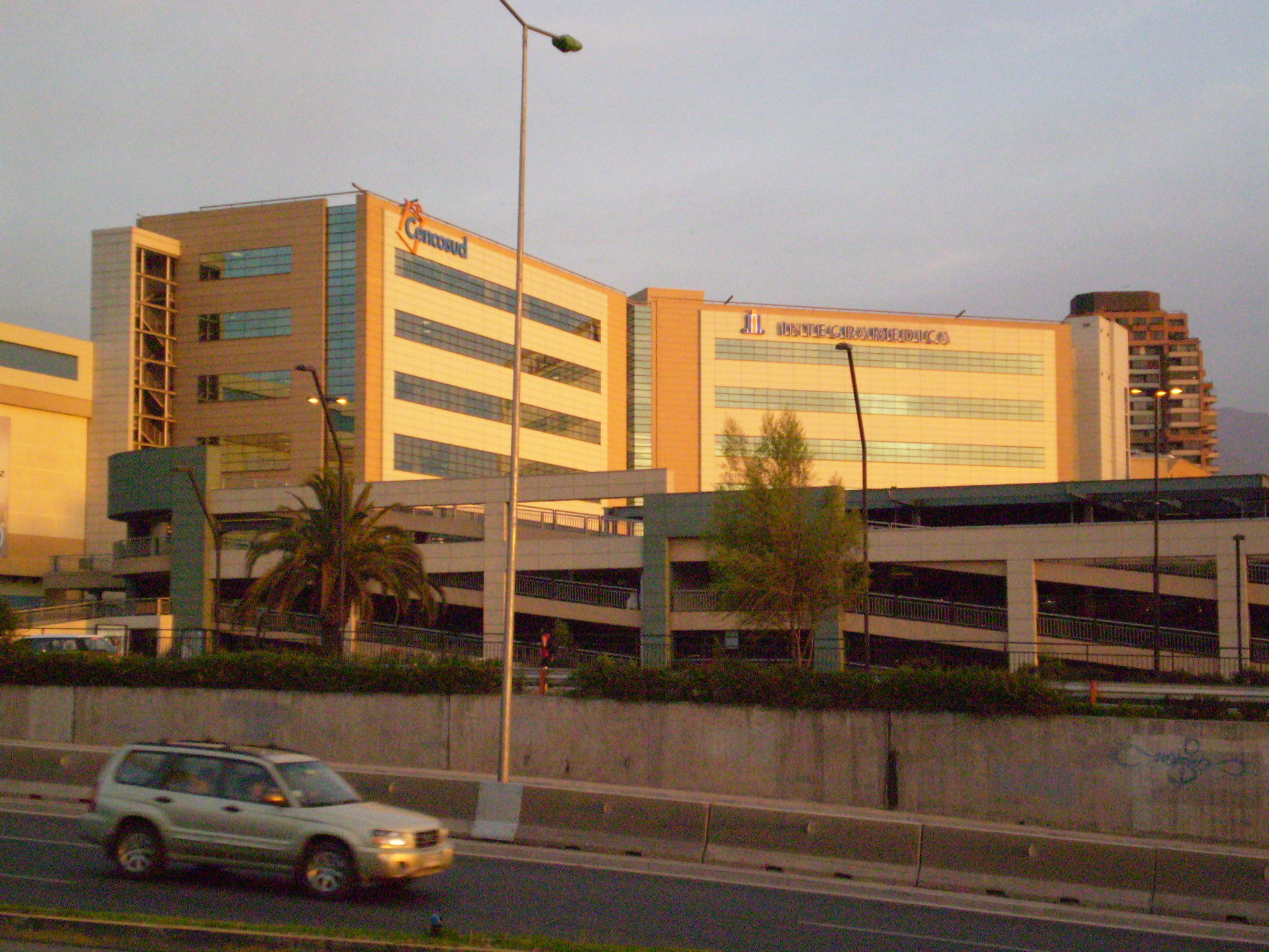 Alto Las Condes (Vista desde frente, foto tomada desde Av. Kennedy lateral dirección poniente)